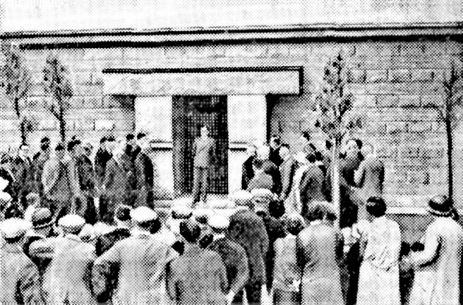 Weihestunde am Heldendenkmal von Langemarck. Anlässlich der Einweihung des Friedhofs am 10. Juli 1932 hielt der Münchner Schriftsteller Josef Magnus Wehner, der selbst an der Westfront verwundet worden war, eine später weitverbreitete Rede; gleichzeitig fanden im gesamten Deutschen Reich Gedenkfeiern statt.